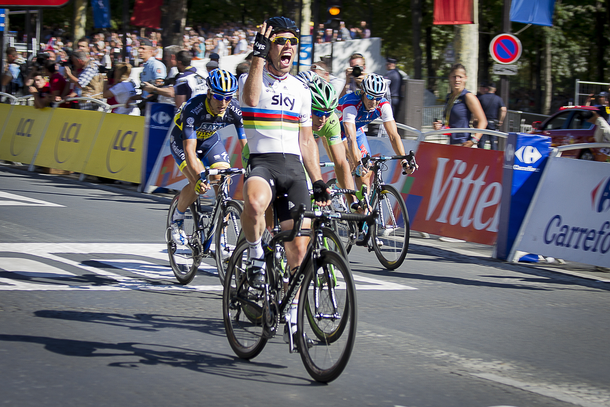 Joie de Mark CAVENDISH Lors de sa victoire sur la 20e et dernière du tour de France 2012 (4e victoire sur le Champs Elysées) - 20e étape du Tour de France 2012, arrivée sur les champs Elysées à Paris lors de la dernière étape entre Rambouillet et paris les Champs Elysées le dimanche 22 juillet 2012 - © William Morice / MaxPPP